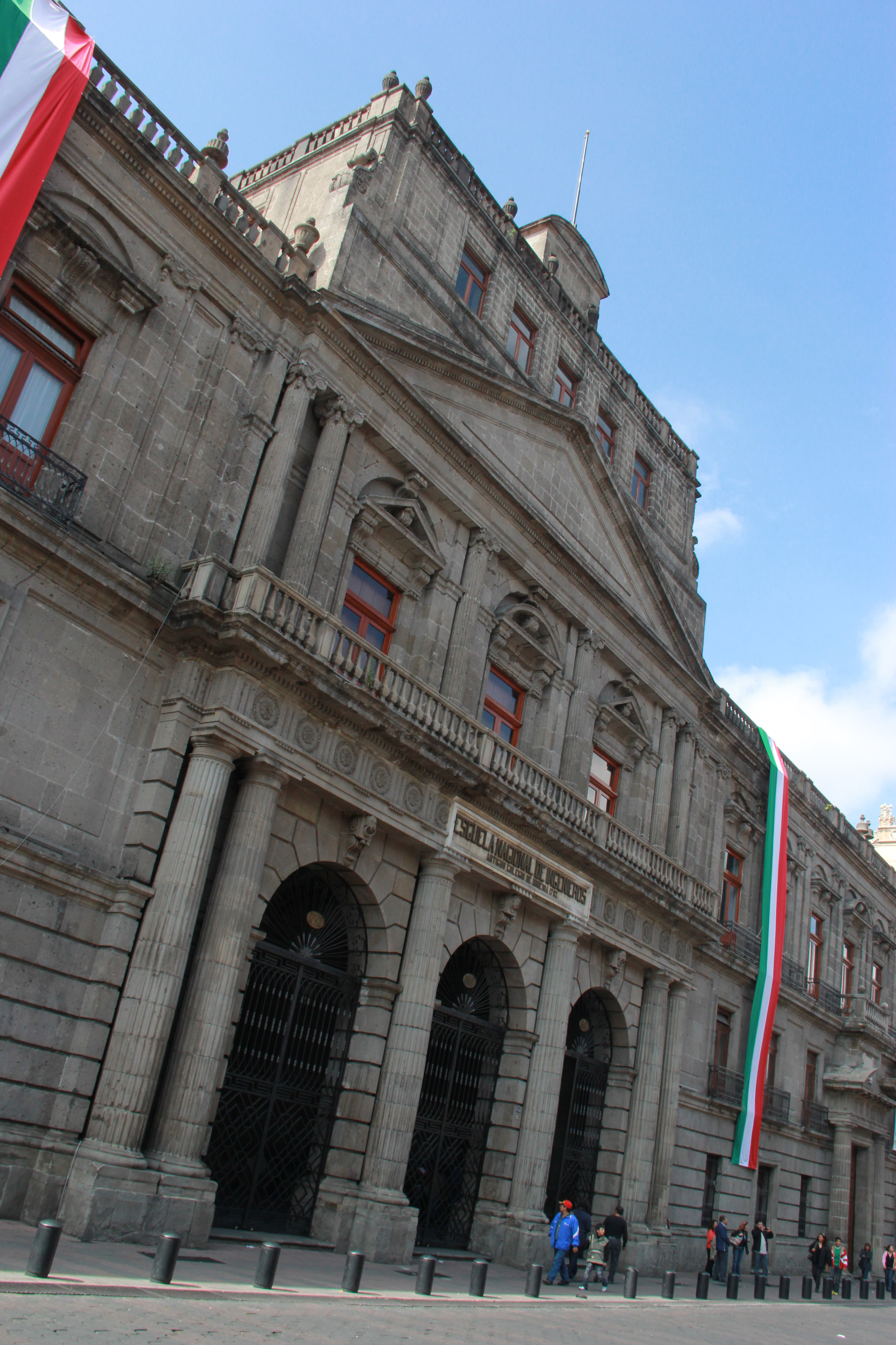 Palacio de Minería: 0253